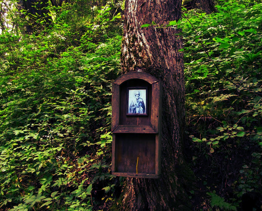 Аязмото на Райловският манастир